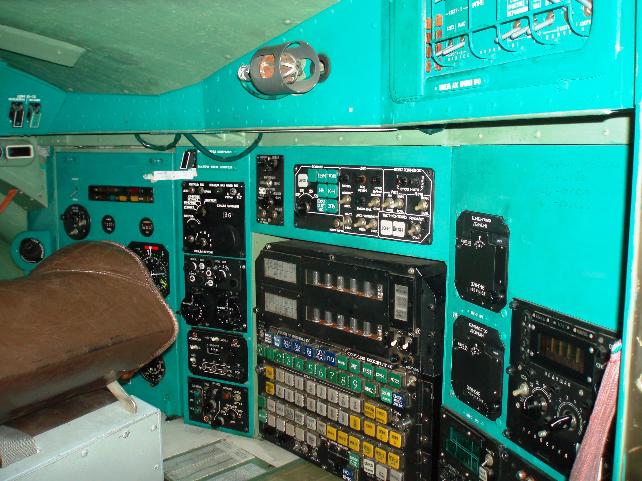 Кабина штурмана навигатора Ту-142МЗ